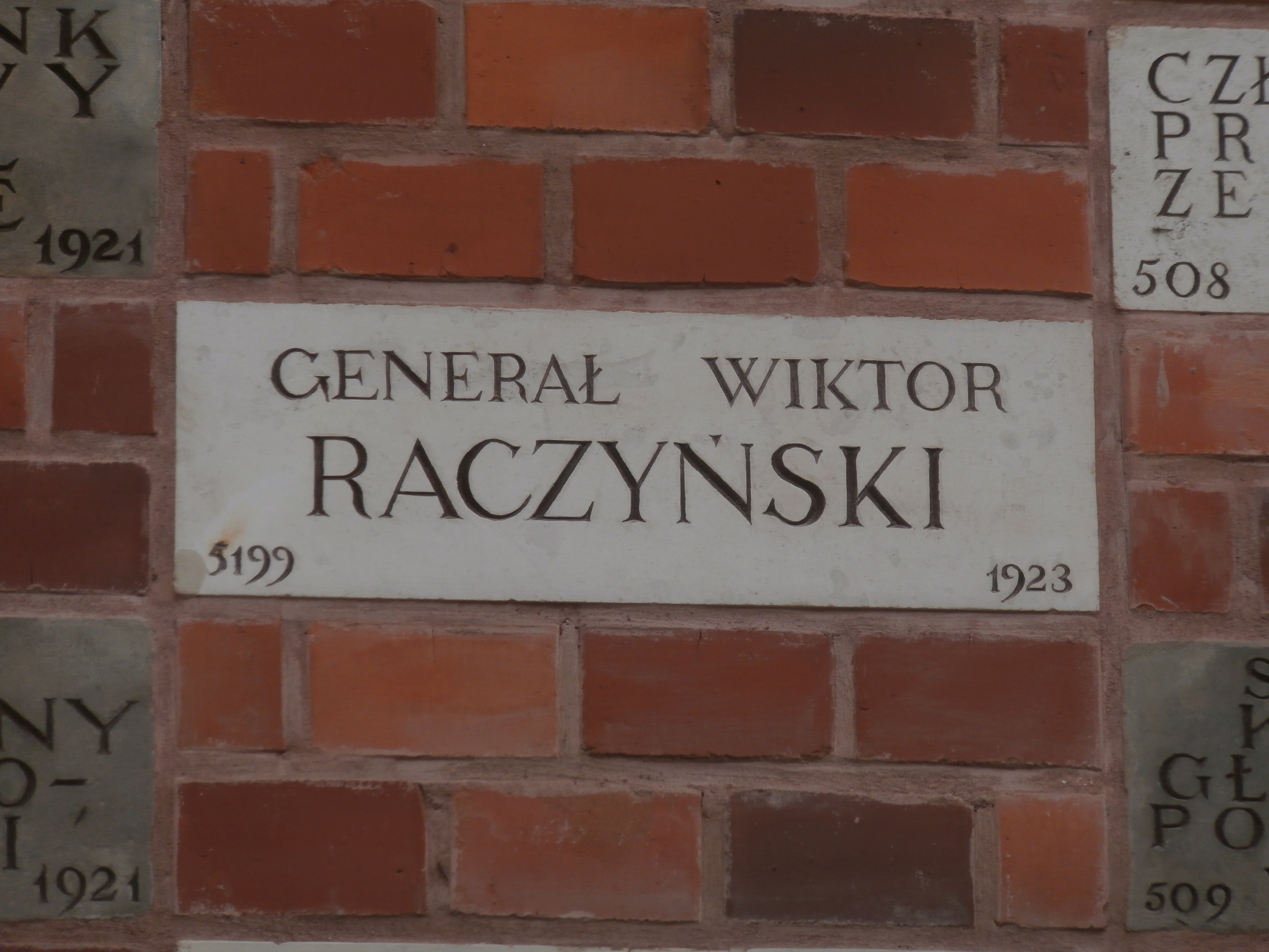 Cegiełka generała Wiktora Raczyńskiego w murze cegiełkowym na Wawelu w Krakowie.